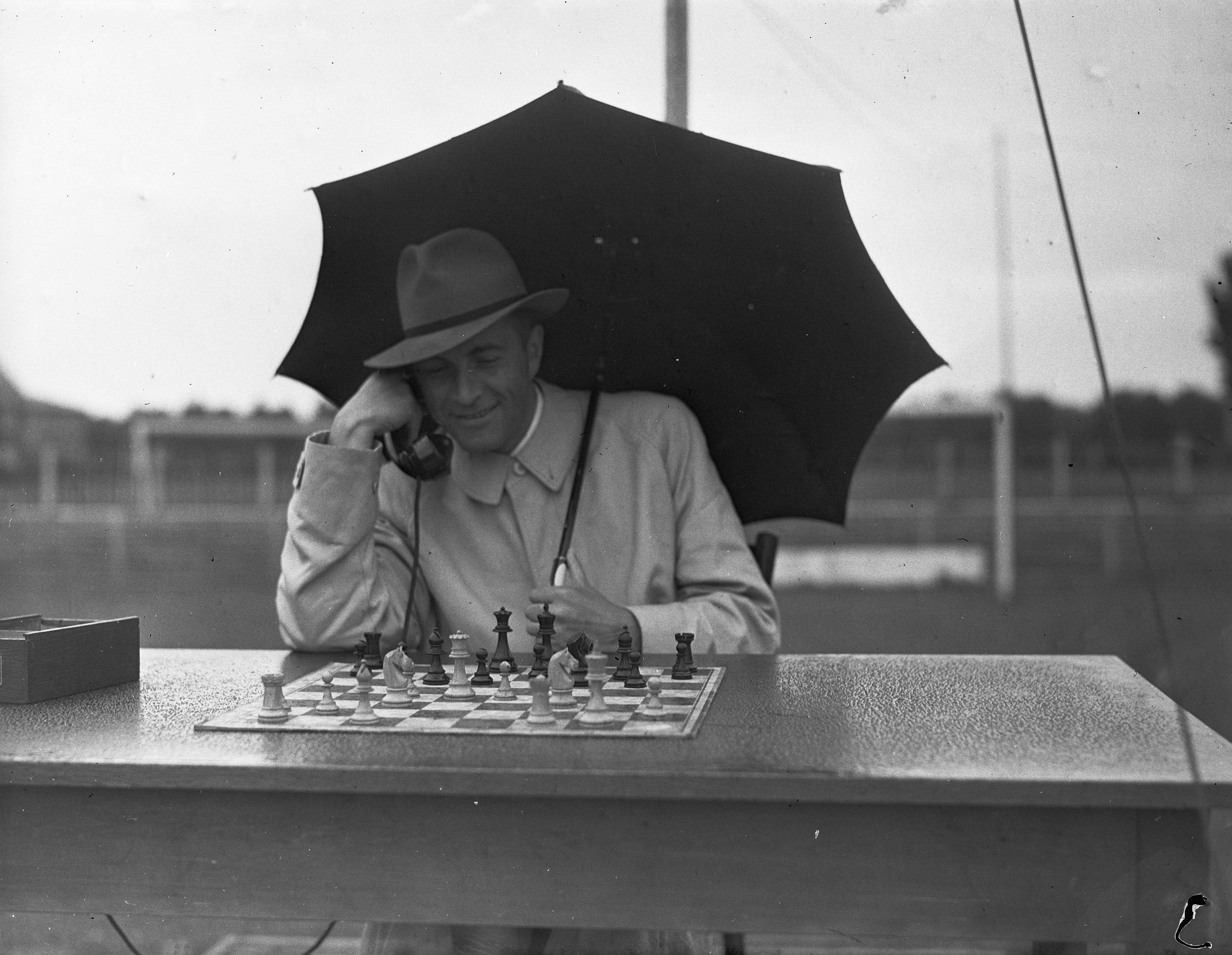 Collectie / Archief : Fotocollectie Anefo Reportage / Serie : [ onbekend ] Beschrijving : Levend schaakspel o.l.v. Max Euwe op het Mosveld te Amsterdam. Schaker Laszlo Szabo tijdens zijn partij Datum : 7 augustus 1946 Trefwoorden : schaakspelen Fotograaf : Fotograaf Onbekend / Anefo Auteursrechthebbende : Nationaal Archief Materiaalsoort : Glasnegatief Nummer archiefinventaris : bekijk toegang 2.24.01.09 Bestanddeelnummer : 901-8858